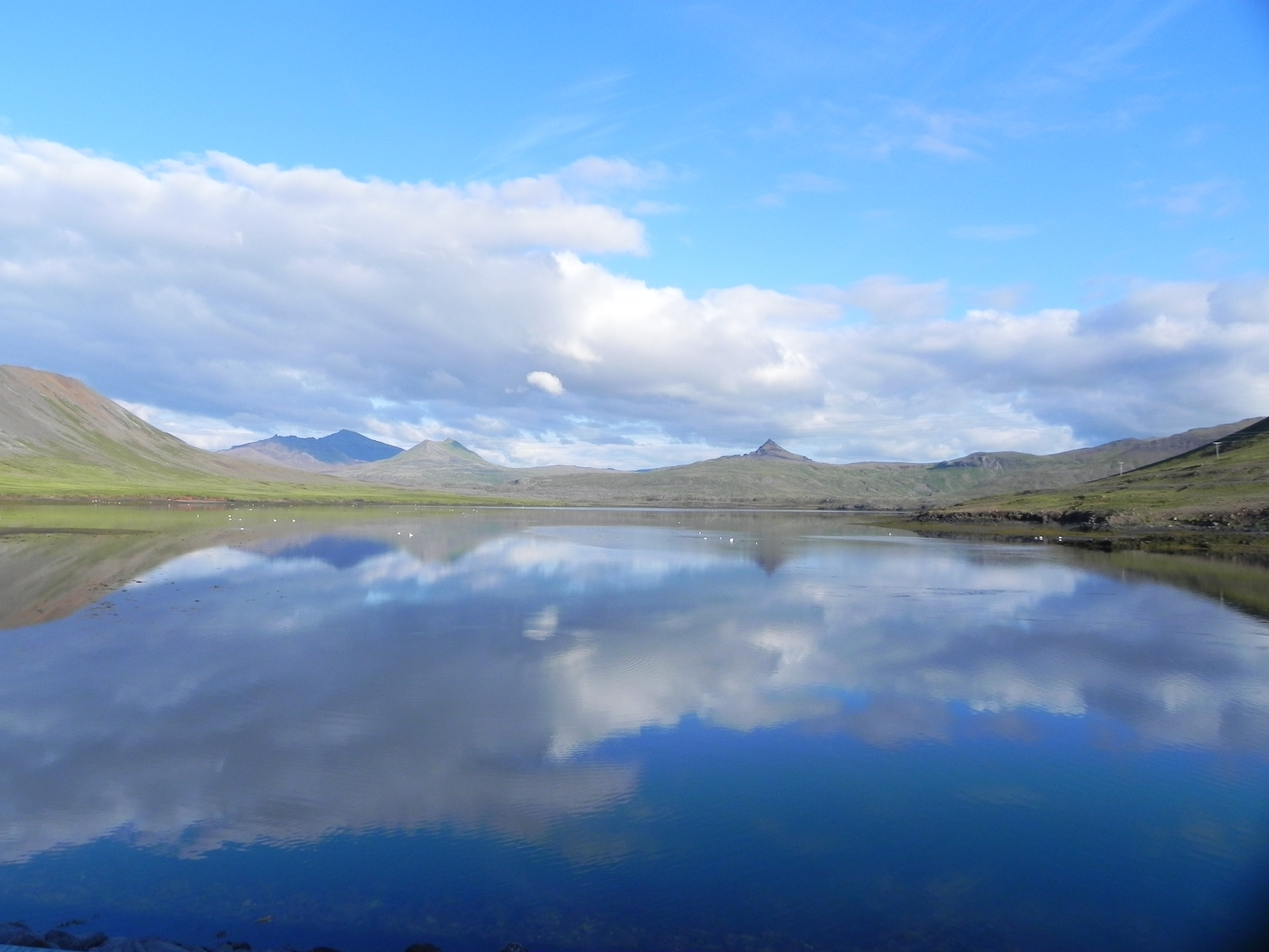 Seljafjörður